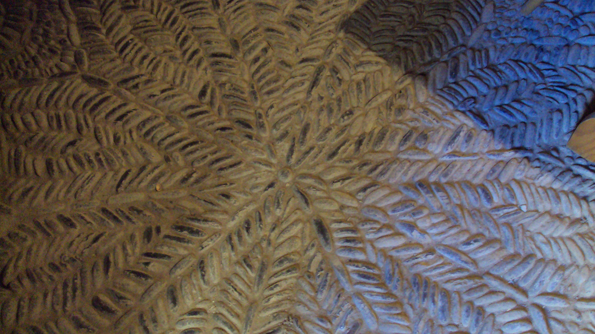 Pavimento original enmorrillado de la casa de los Mur de Aluján